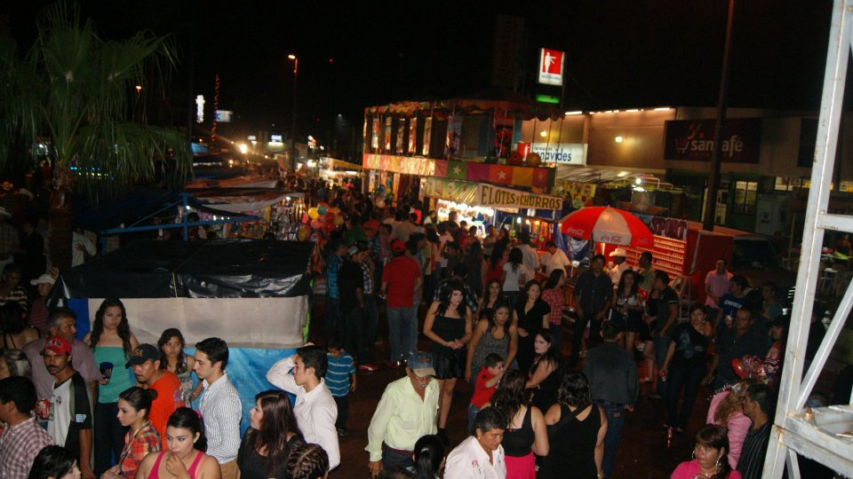 Fiestas de Santa Ana 2012